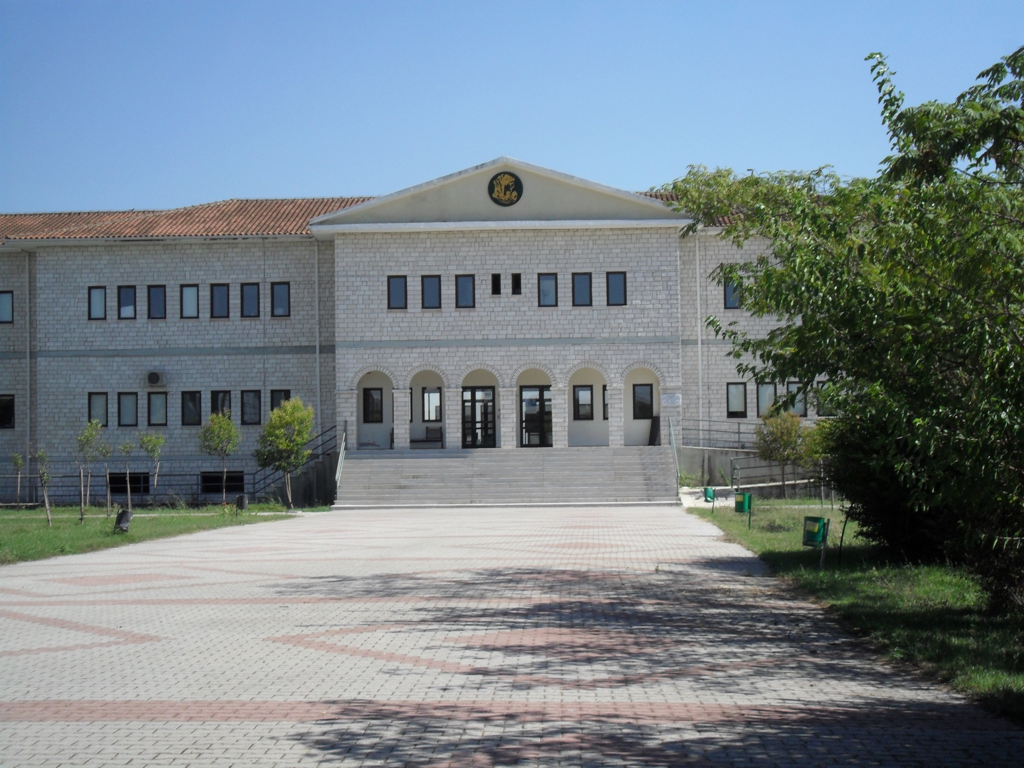 Τμήμα Ανθοκομίας και Αρχιτεκτονικής Τοπίου-ΤΕΙ Ηπείρου-Άρτα